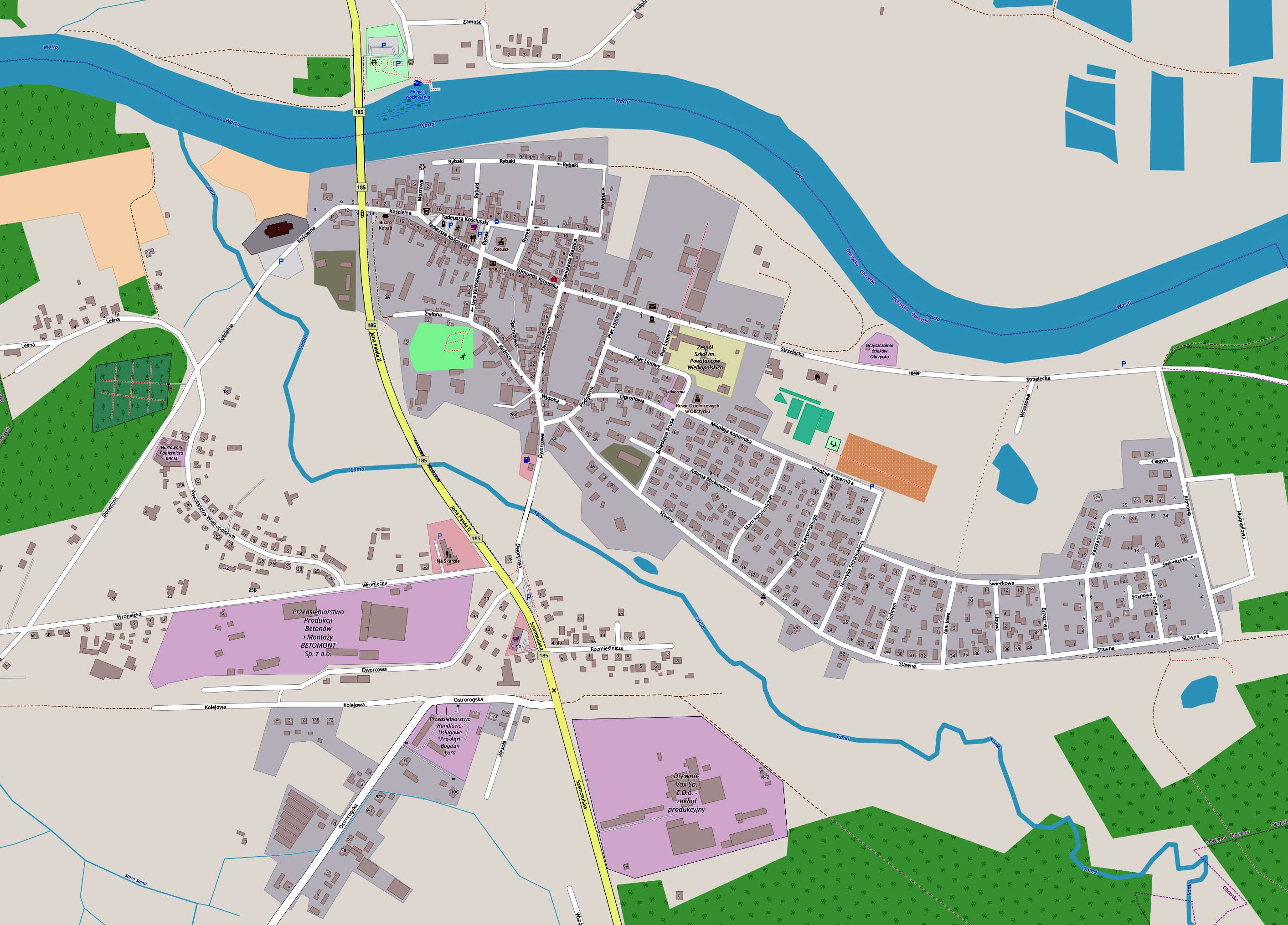 Obrzycko mapa miasta 2018